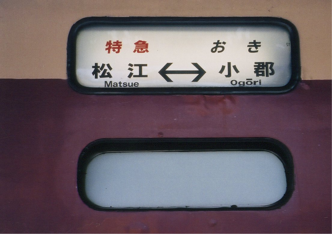 キハ181系臨時おき号行先表示幕 江津駅にて投稿者自身が撮影